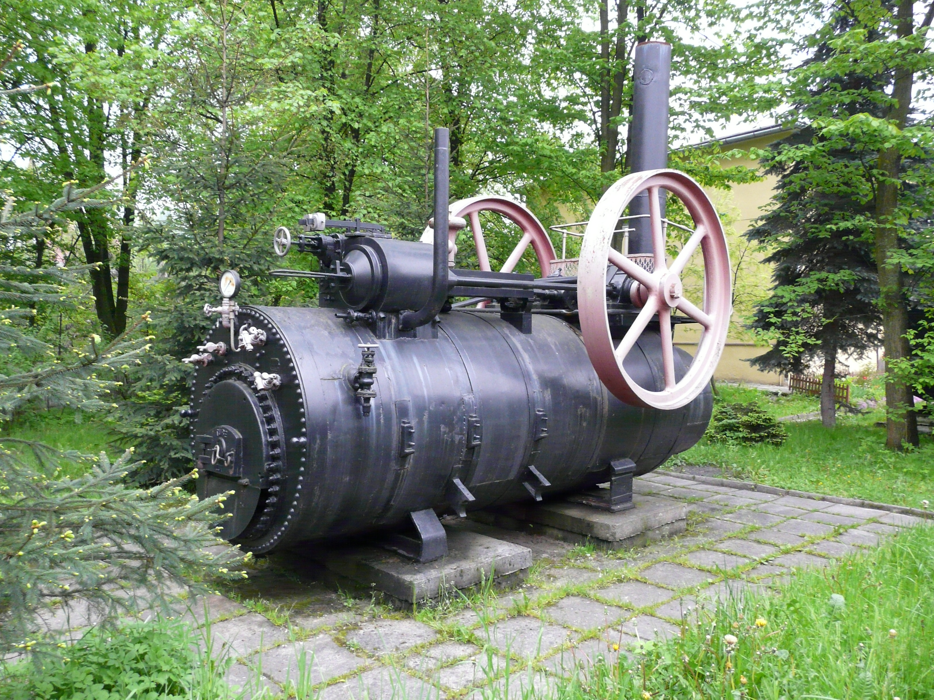 Skansen taboru kolejowego w Chabówce / Chabówka Rolling-Stock Heritage Park